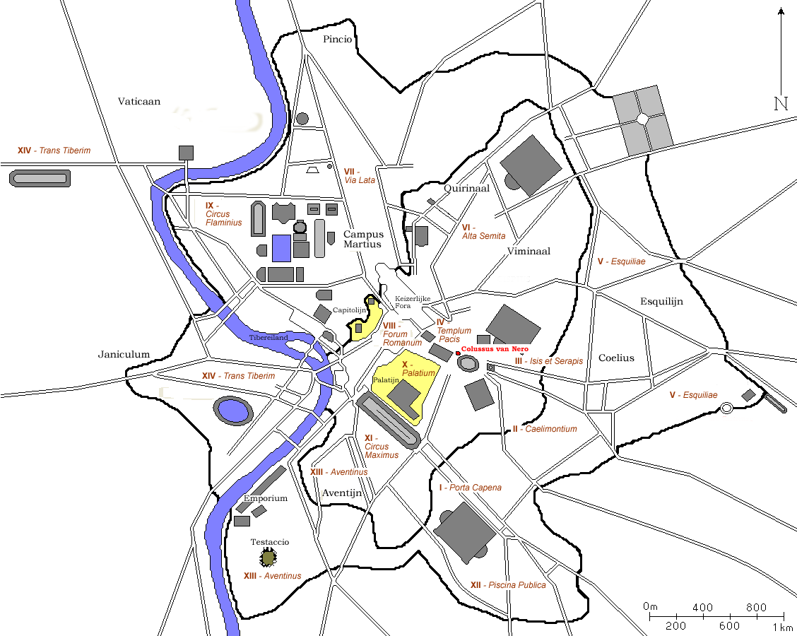 Kaart van antiek Rome waarop de Colossus van Nero is uitgelicht. Kaart is afkomstig van FR:wiki en door mij naar een Nederlandse versie bewerkt. Auteurs: nl::fr:User:ColdEel en Gebruiker:Joris1919